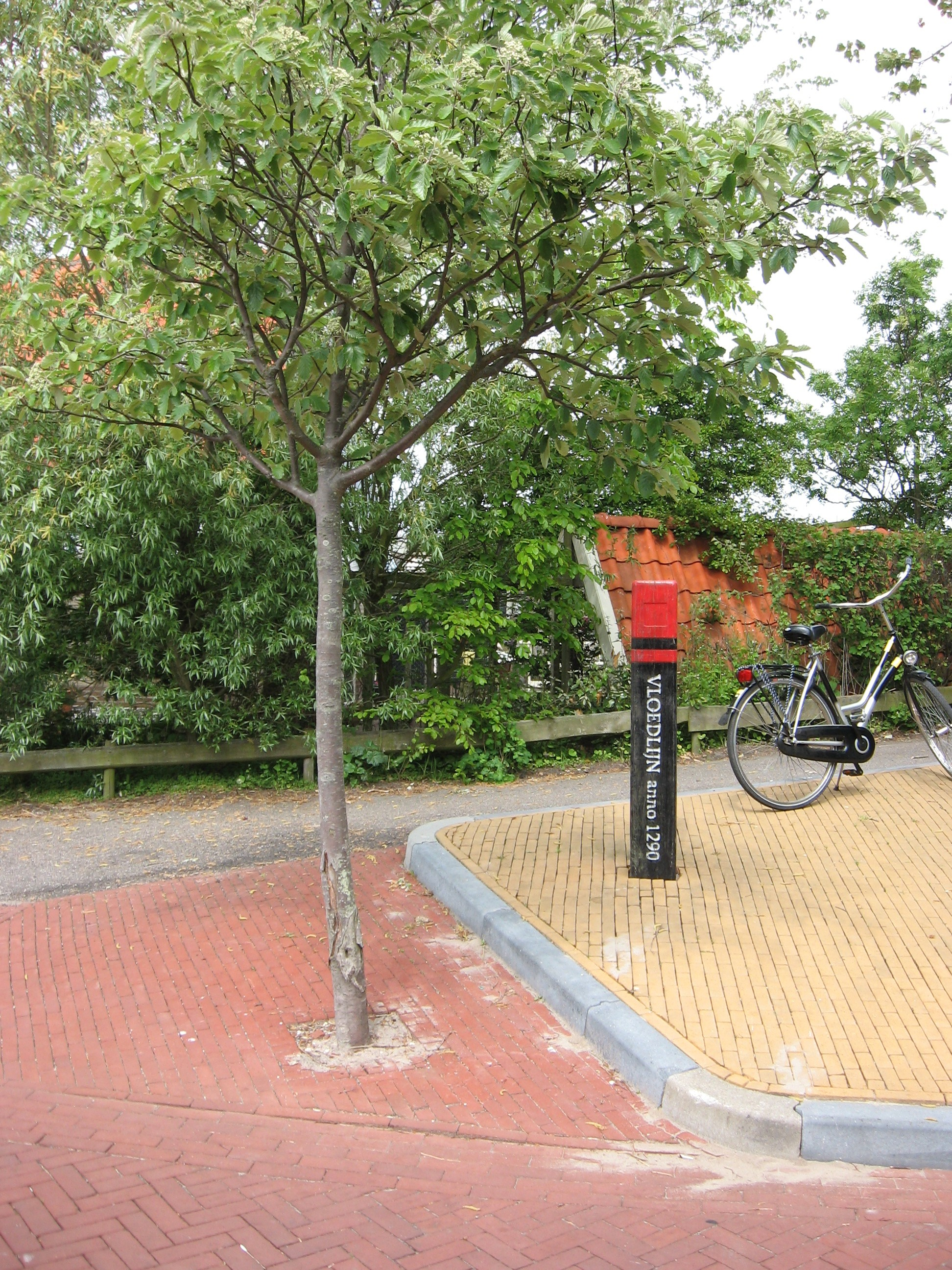 Paal vloedlijn 1290